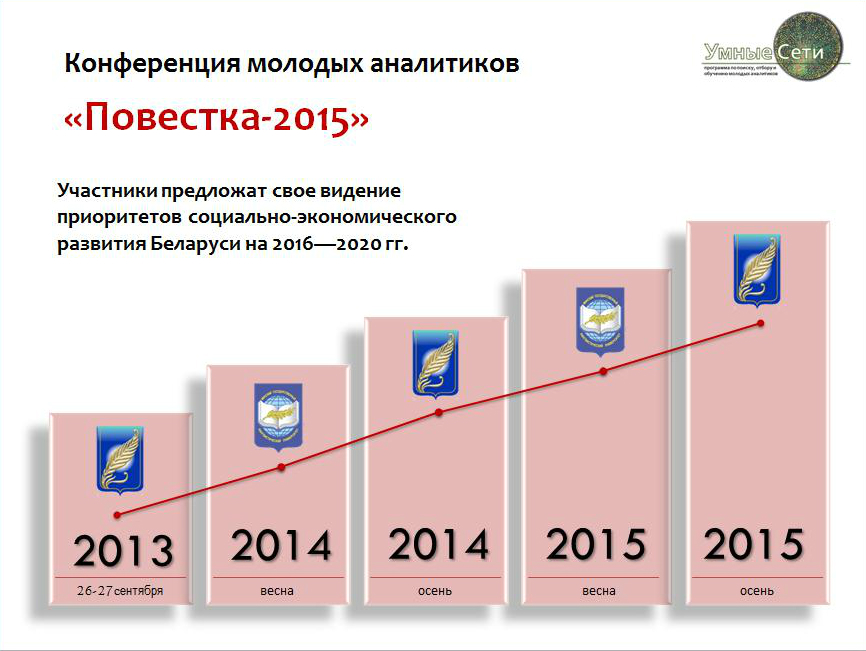 Этапы республиканской научно-практической конференции молодых аналитиков"Повестка-2015"